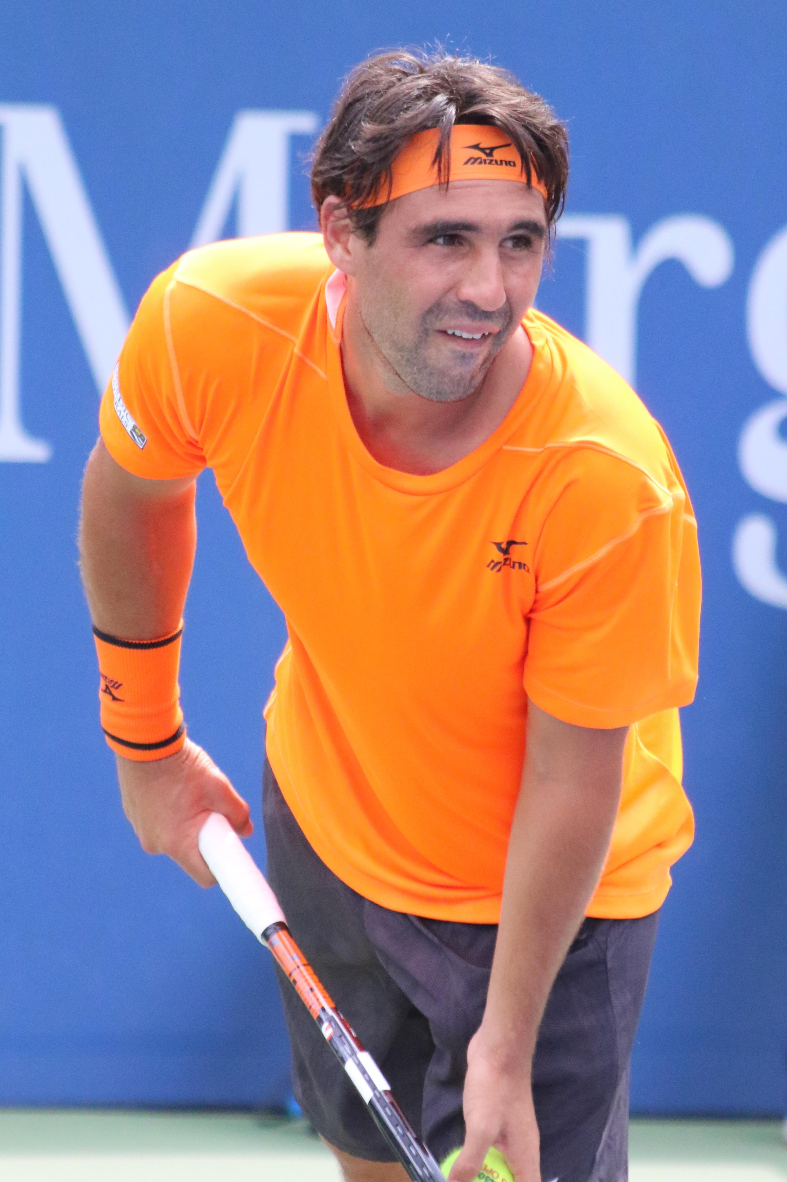 Baghdatis US16 (4)